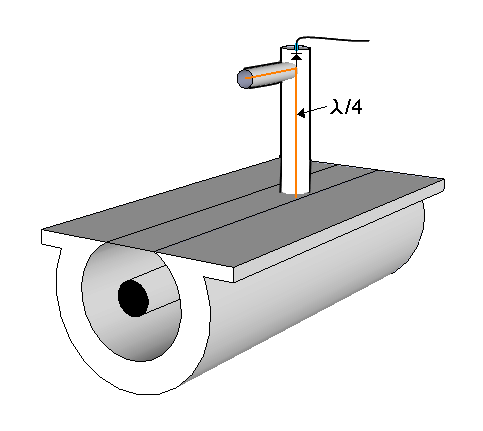 Schnittbild eines Stehwellenmessgerätes, mit dem sich die Spannungsänderungen am Innenleiter eines Koaxkabels bestimmen lassen. Die kapazitiv ausgekoppelte Spannung regt den orange gezeichneten λ/4-Schwingkreis an, an dessen Anzapfung die HF-Spannung gleichgerichtet wird. Mit einem verschiebbaren Kurzschluss am linken Ende des Schwingkreises wird Resonanz eingestellt. Zur genauen Messung der Abstände von Maxima und Minima kann der Messkopf parallel zum Innenleiter verschoben werden.